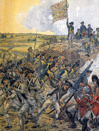 French-troops-attacking-Spring-Hill-Redoubt